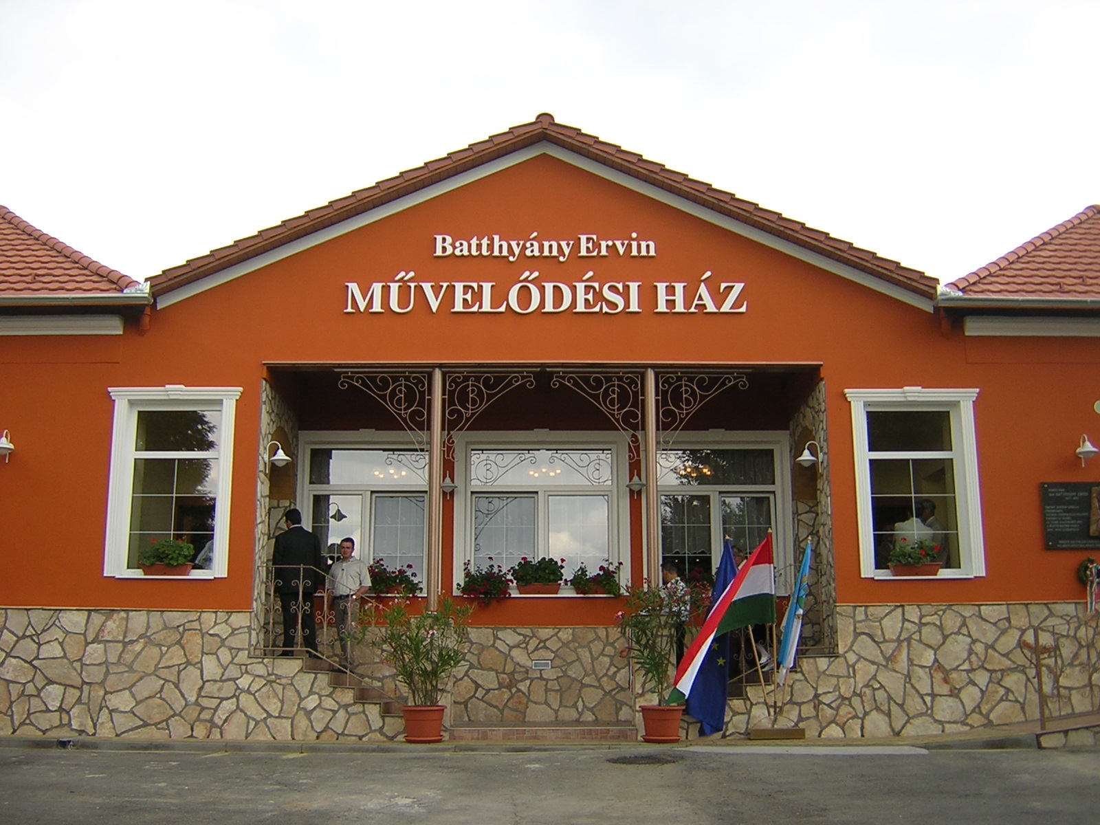 Batthyány Ervin művelődési ház, Bögöte (Vas megye)